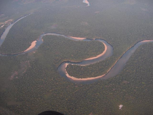 Rio Orinoco(river), Estado Amazonas - Venezuela